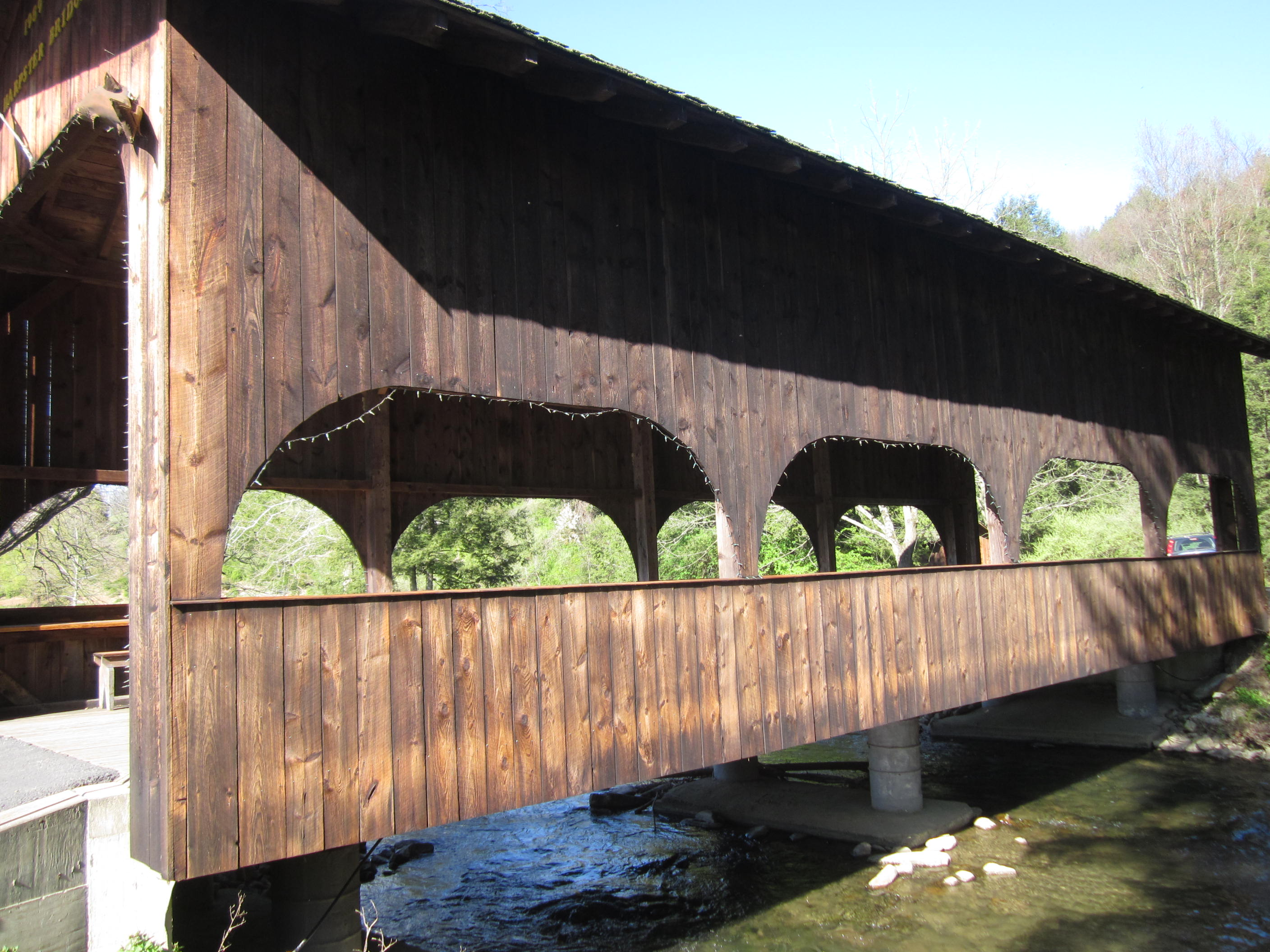 Harpster Covered Bridge - Pennsylvania